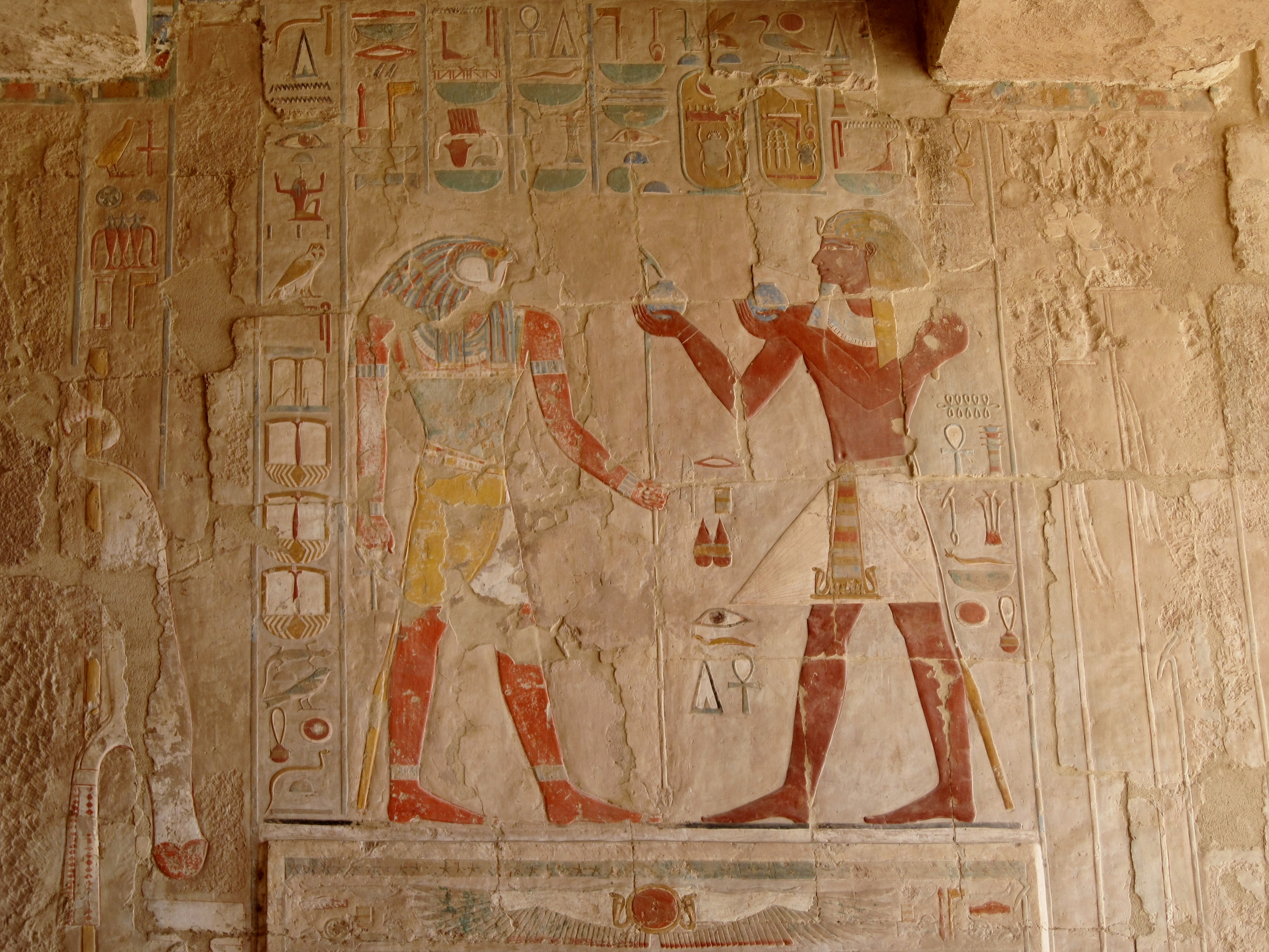 Wandbild im Totentempel der Königin Hatschepsut in Deir el-Bahari (arabisch für „Nordkloster“), Theben-West (Luxor), Ägypten